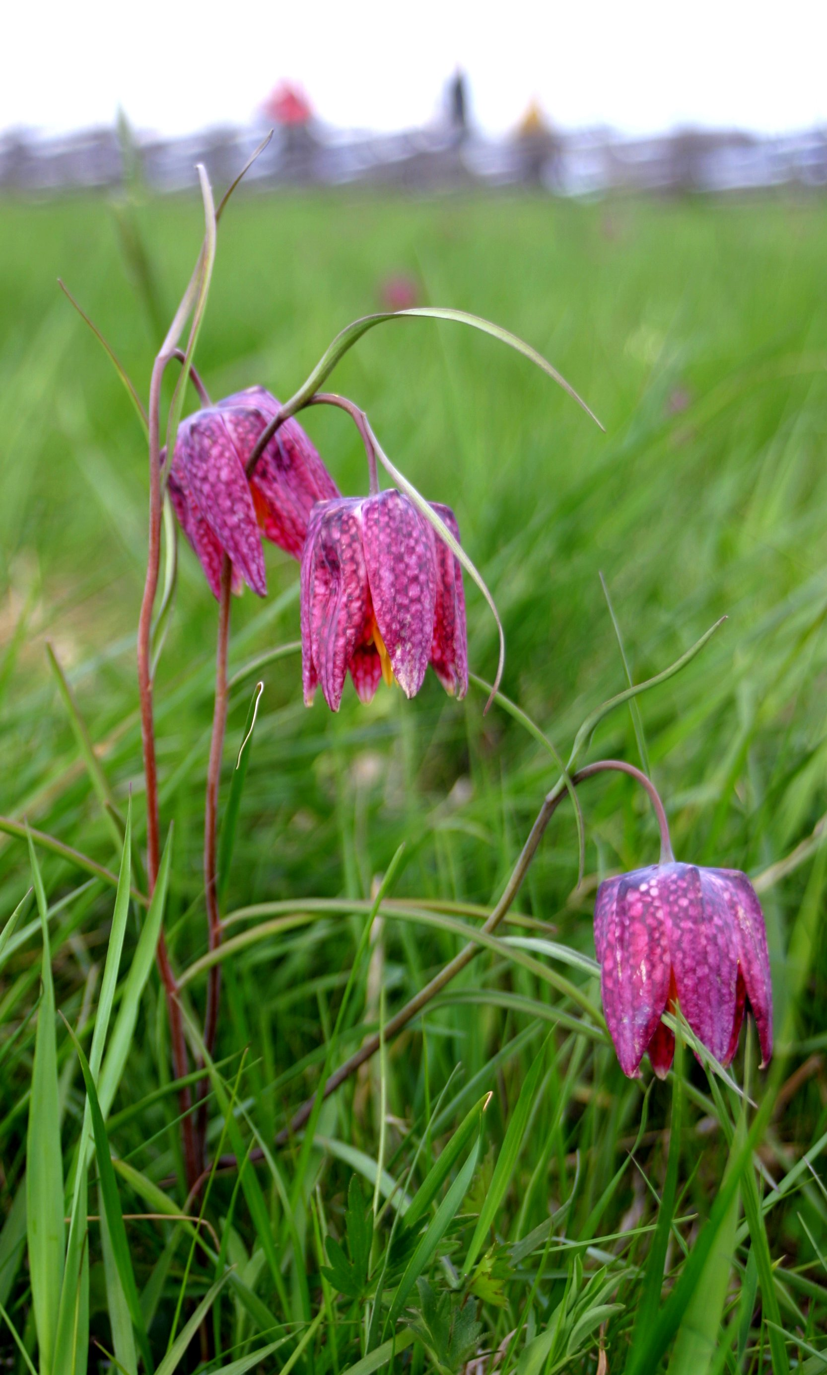 Fritllaria meleagris. Photo: Olof Ekström 2006 (user OlofE), location Kungsängen, Uppsala, Sweden.